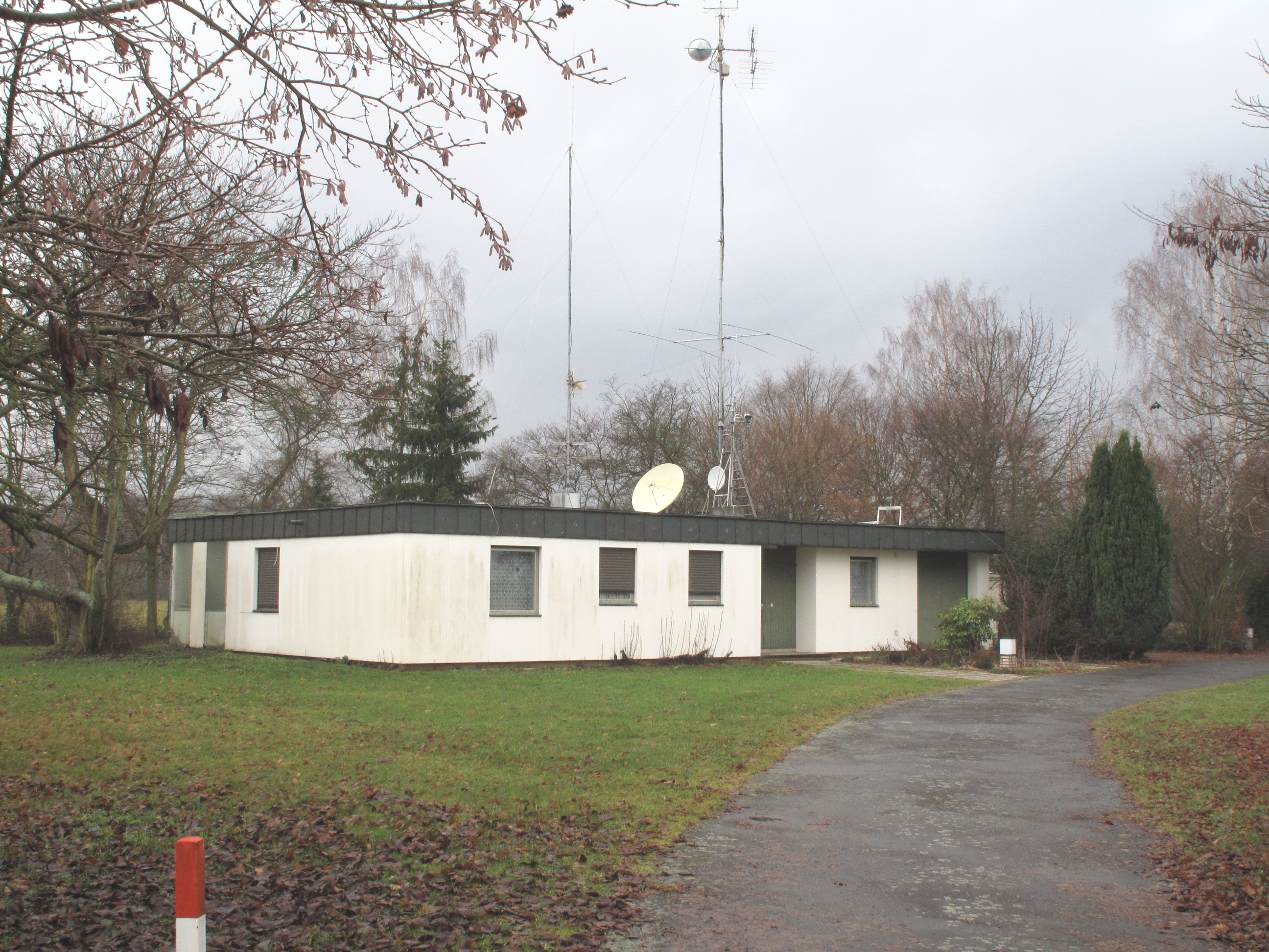 Ehemaliges Dienst- und Wohngebäude des Sendewarts des HR-Senders Weiskirchen.